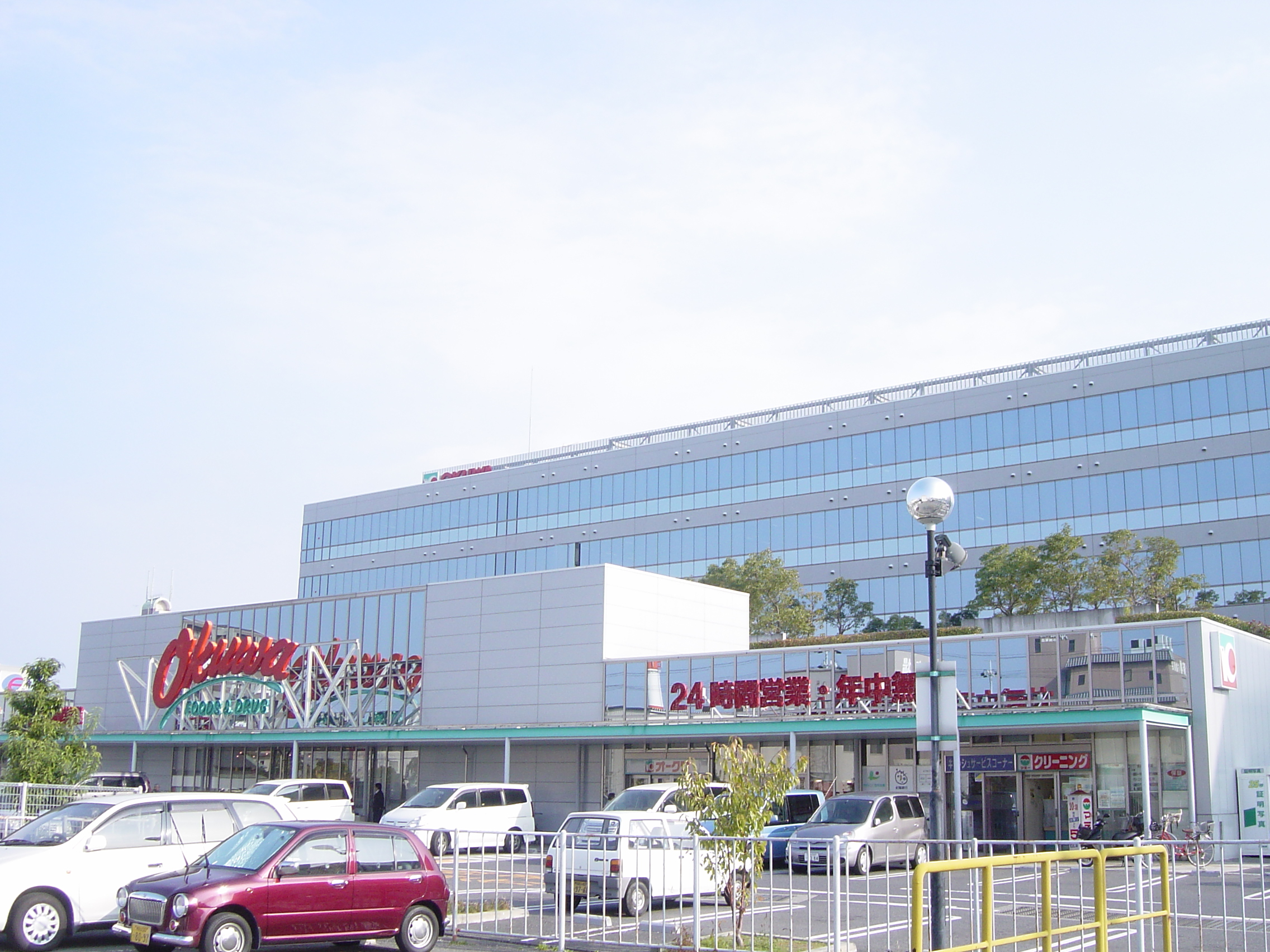 オークワ本社中島店